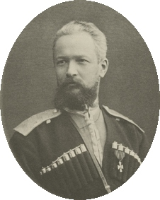 генерал-майор И. Ф. Тутолмин